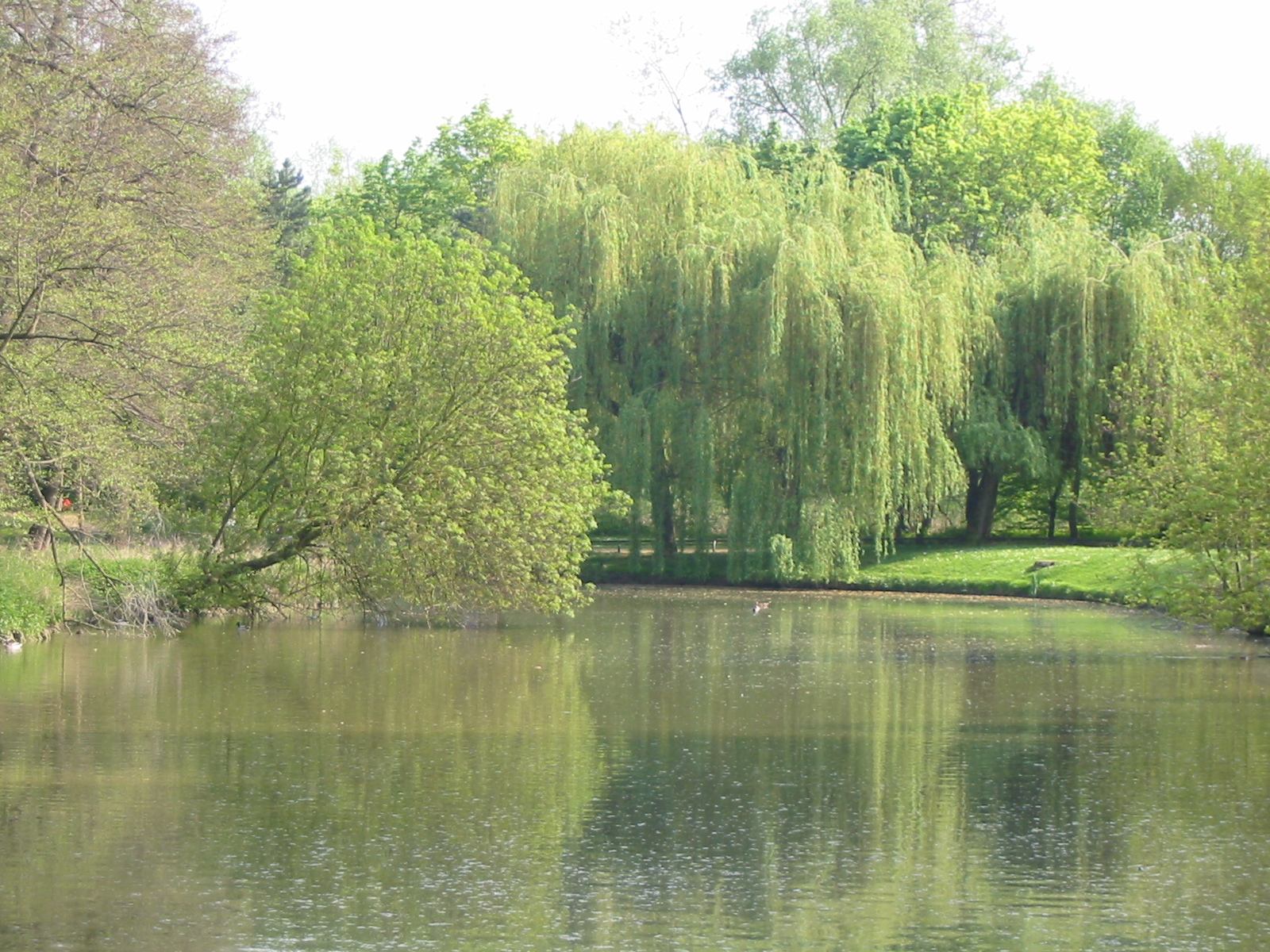 Le parc de Reigate and Banstead à Brunoy (Essonne).